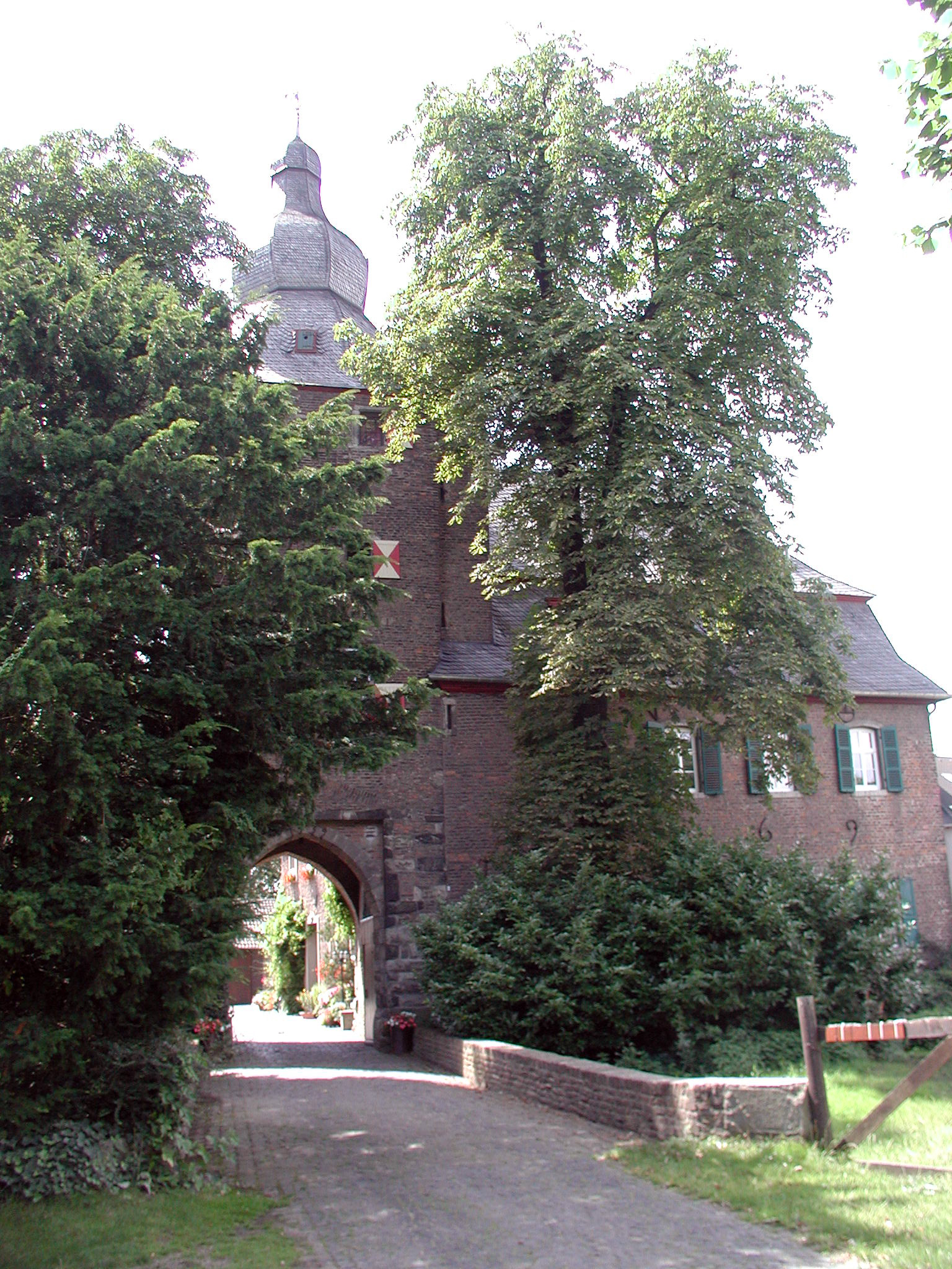 Burganlage Hürth-Efferen